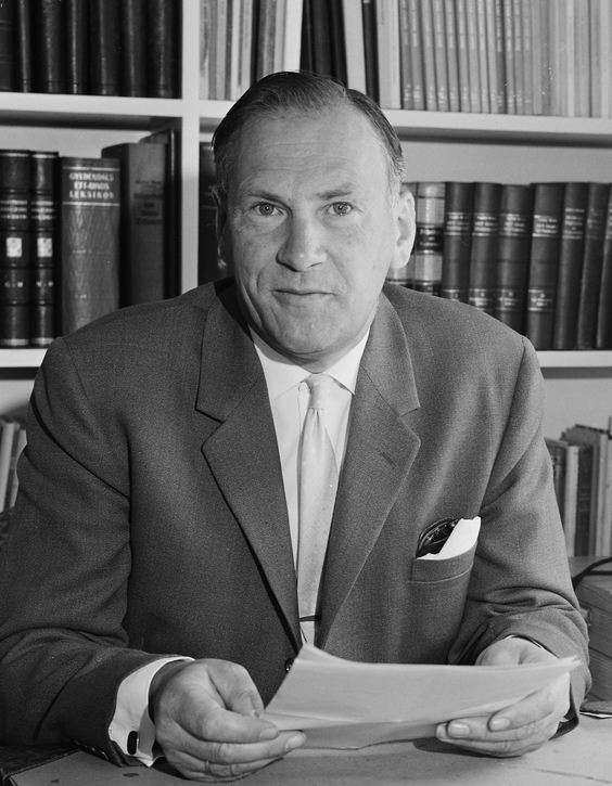 Dagfinn Hauge (1908–2007), biskop i Tunsberg bispedømme fra 1962 til 1978